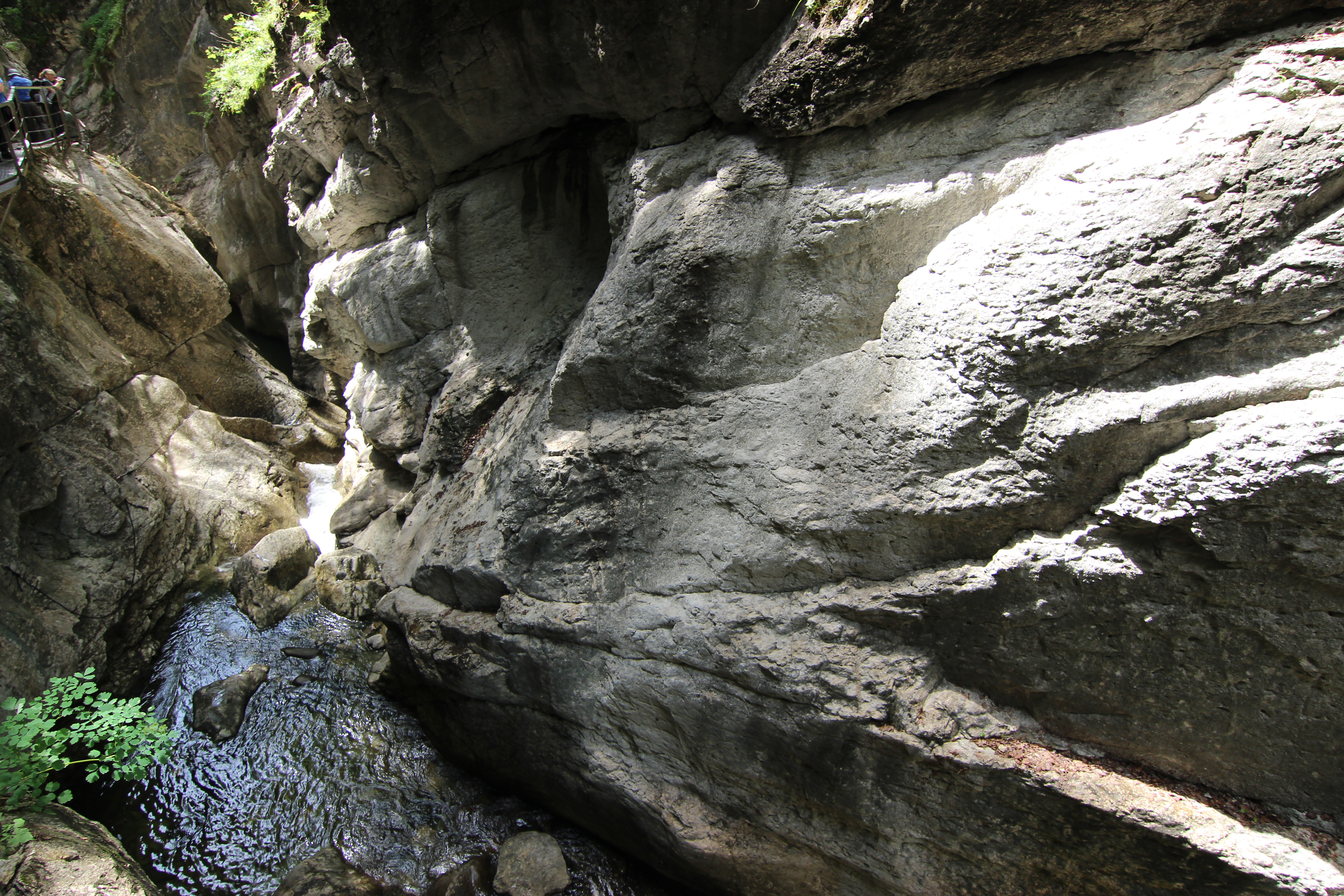 Die Starzlachklamm bei Sonthofen-Winkel.